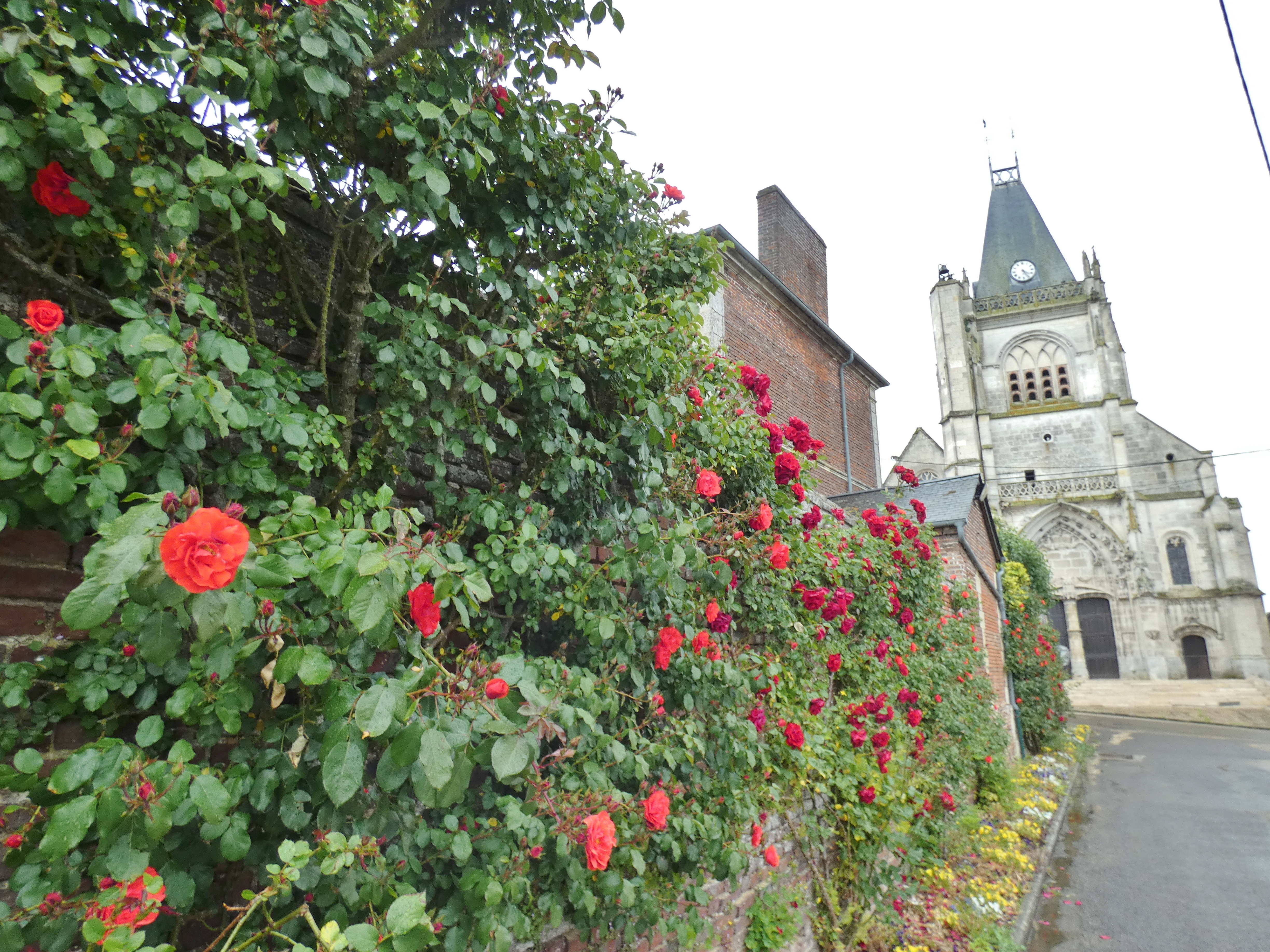 L'église Saint-Martin de Bulles et massif fleuri depuis la rue des Telliers